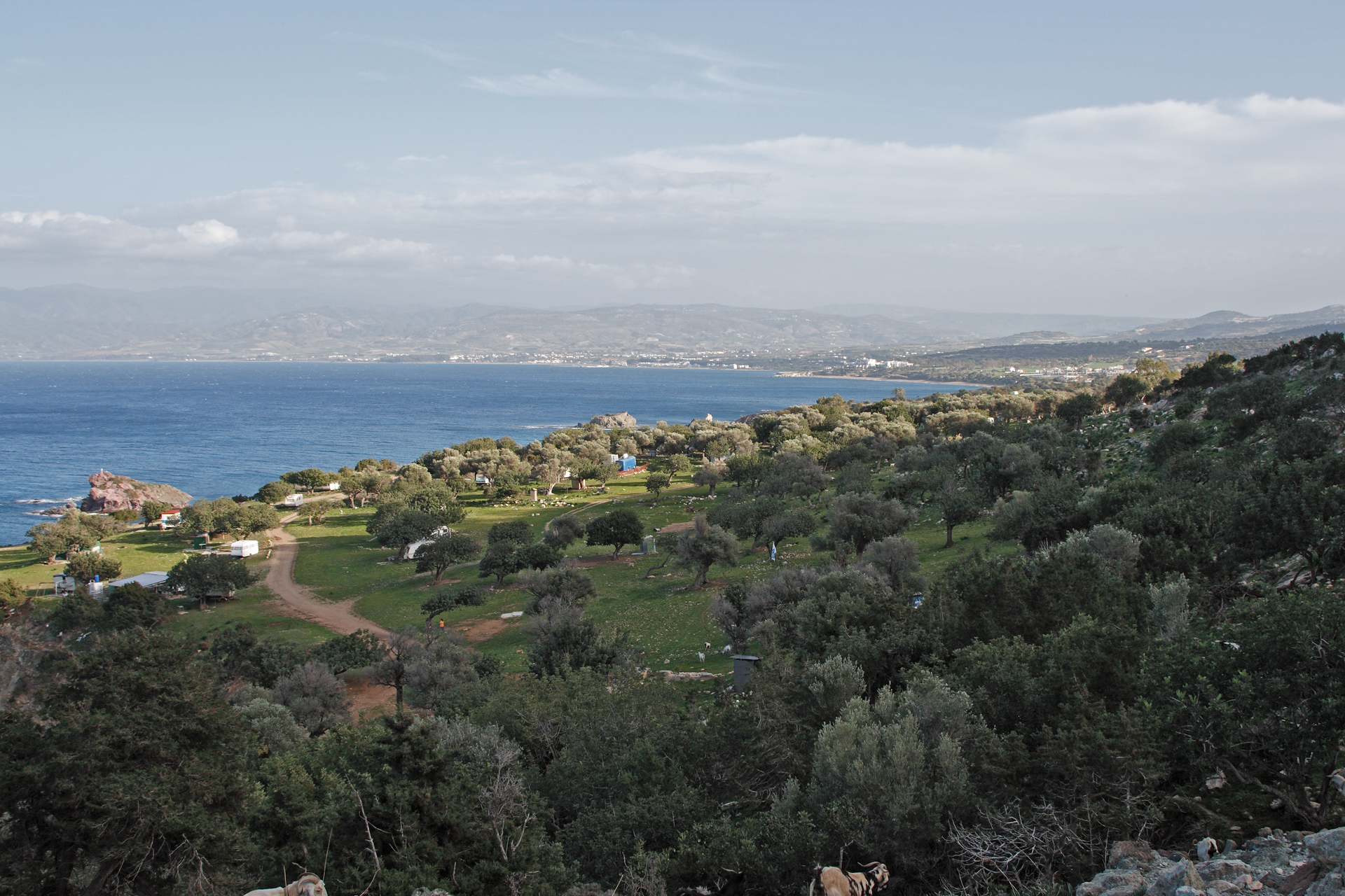 Akamas, Cyprus